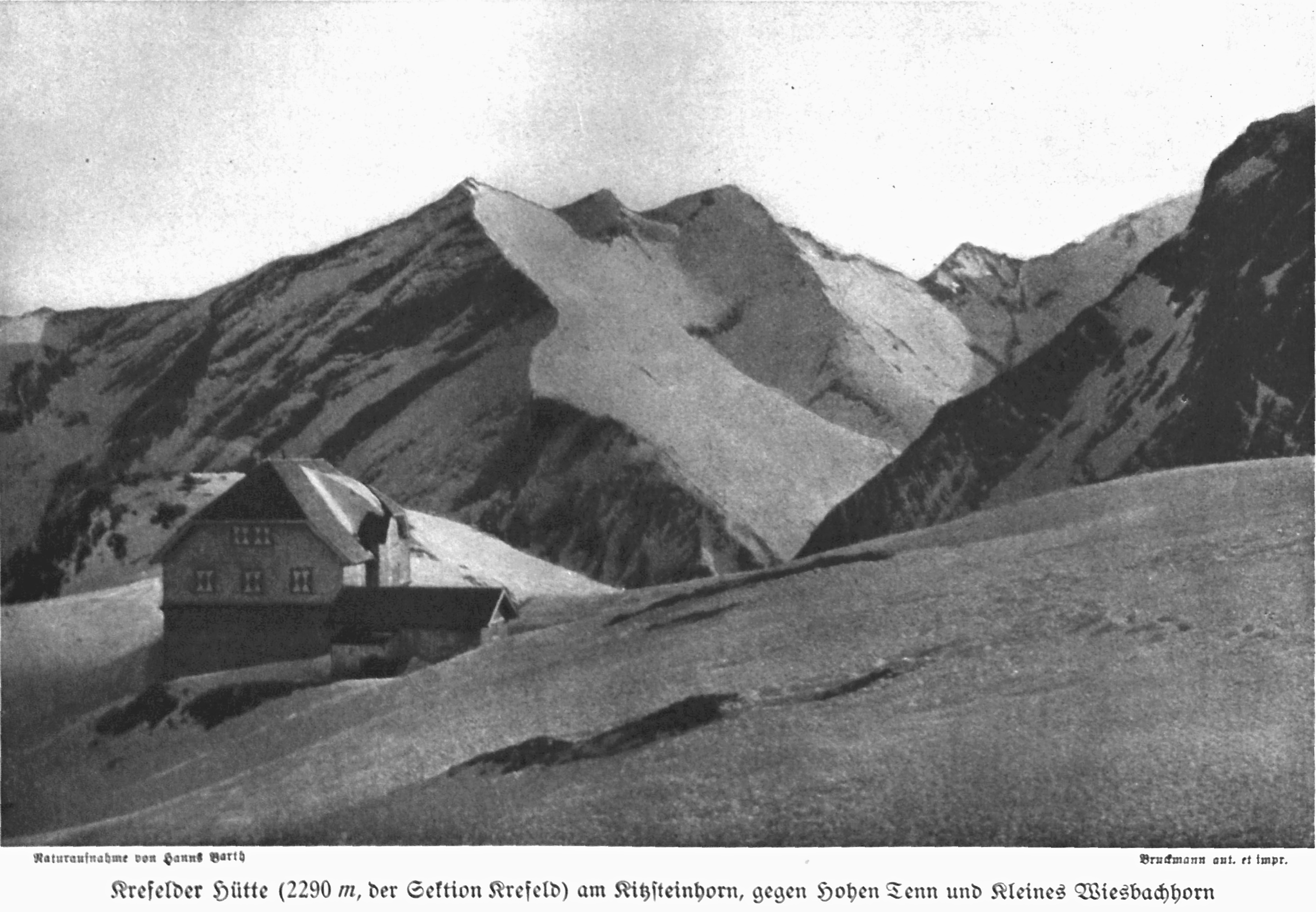 Krefelder Hütte (2290m der Sektion Krefeld) am Kitzsteinhorn, gegen Hohen Tenn und Kleines Wiesbachhorn aus Zeitschrift des Deutschen und Oesterreichischen Alpenvereins 1919 Band 50